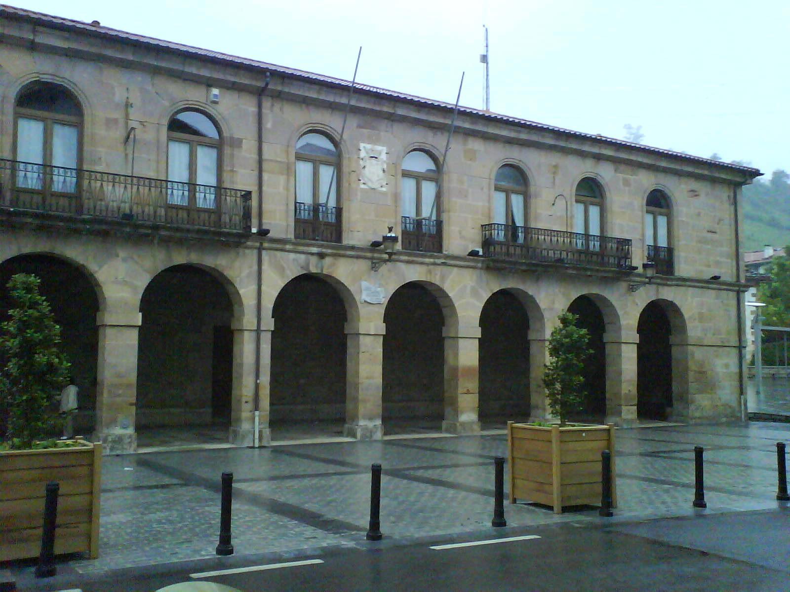 Cegama, Casa consistorial. Guipúzcoa, País Vasco (España).